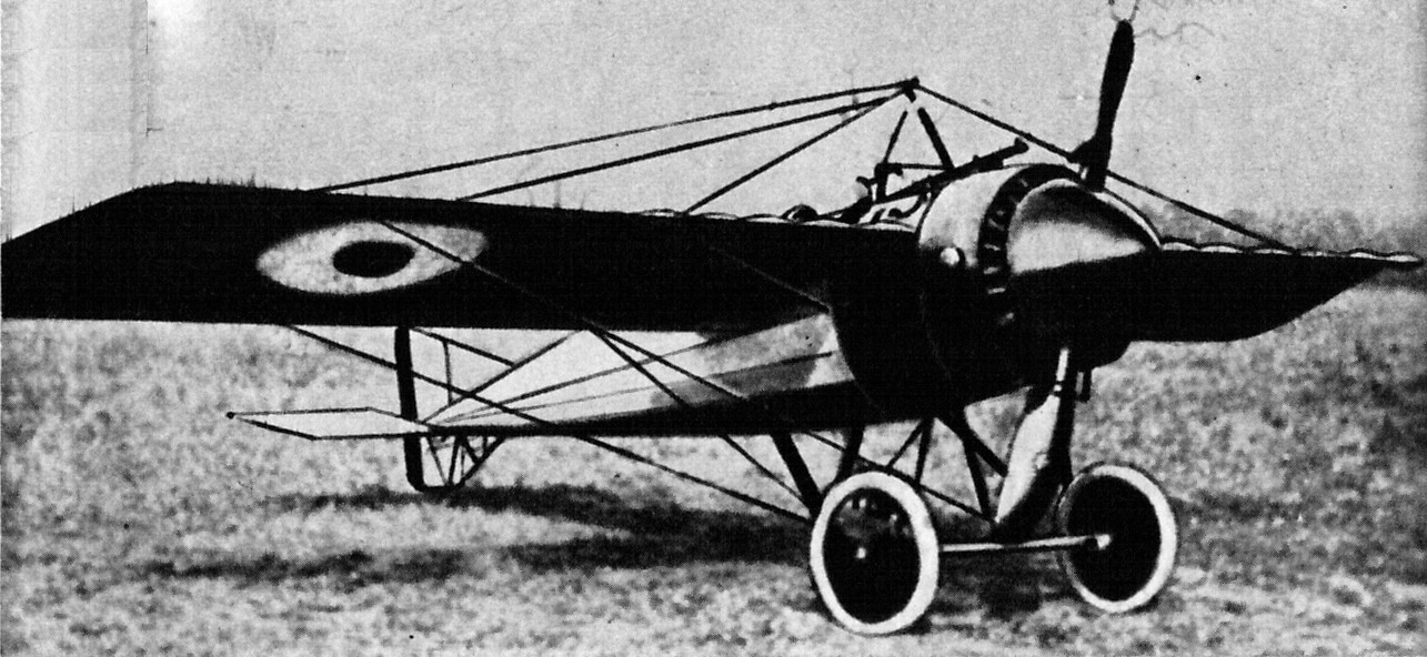 Francuski samolot myśliwski Morane-Saulnier N.